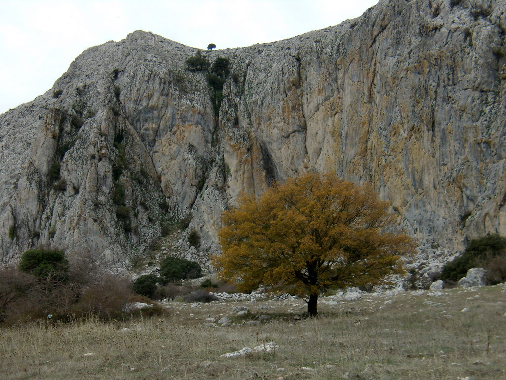 Cerro del Realengo, Sierra de Camarolos